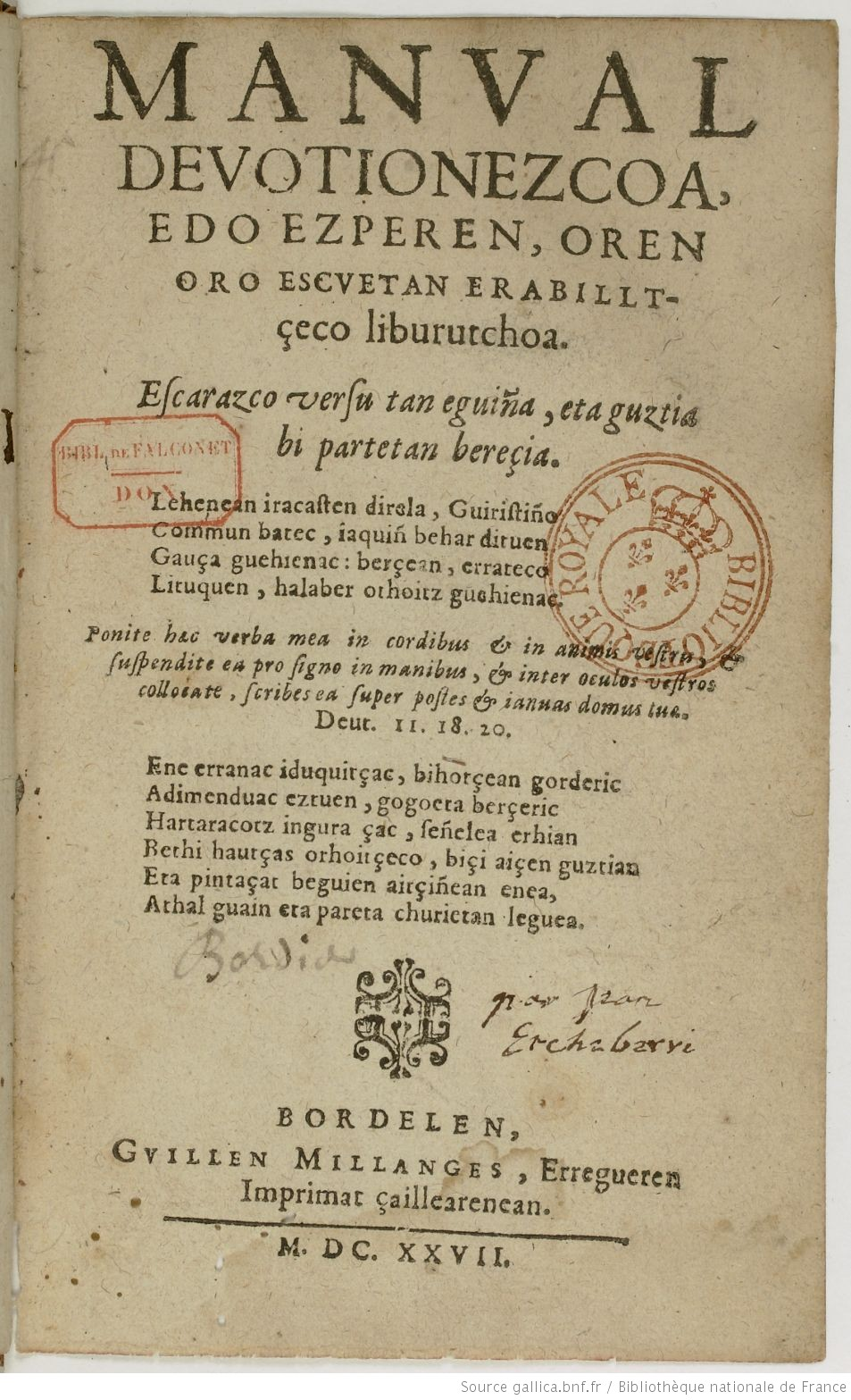 Manual Devotionezcoa liburuaren lehen orrialdea